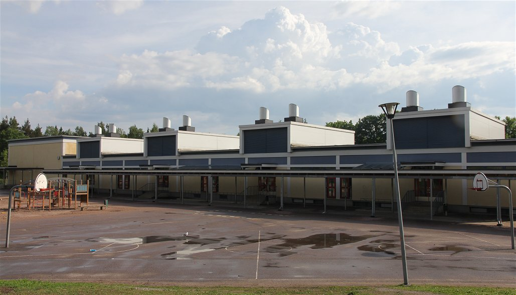 Hiekkaharjun koulun pihaa; koulu on Vantaan Hiekkaharjussa toimiva, vuonna 1971 toimintansa aloittanut suomenkielinen alakoulu.